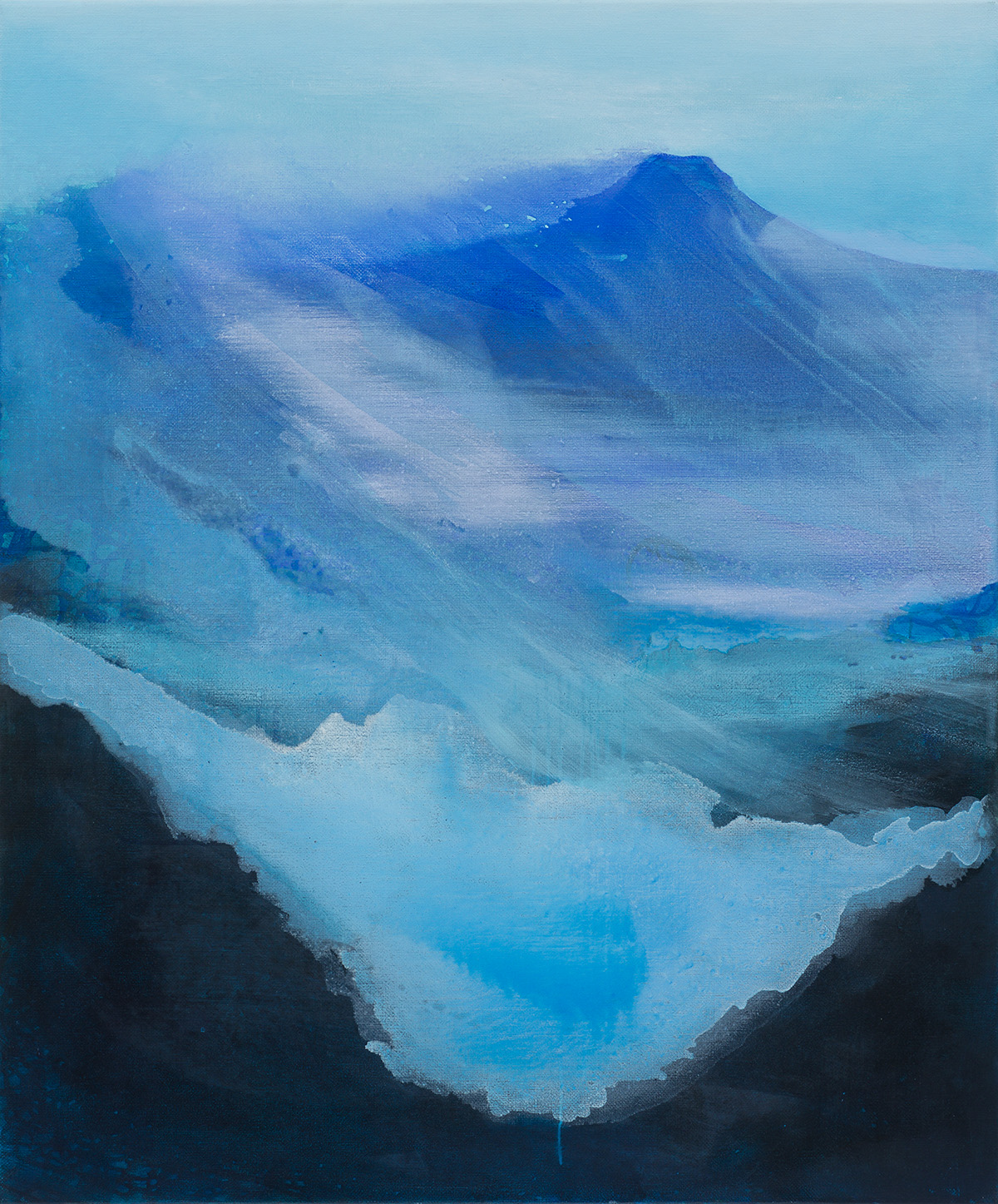 Kontra Ágnes: Lelkek kifutópályája című festménye